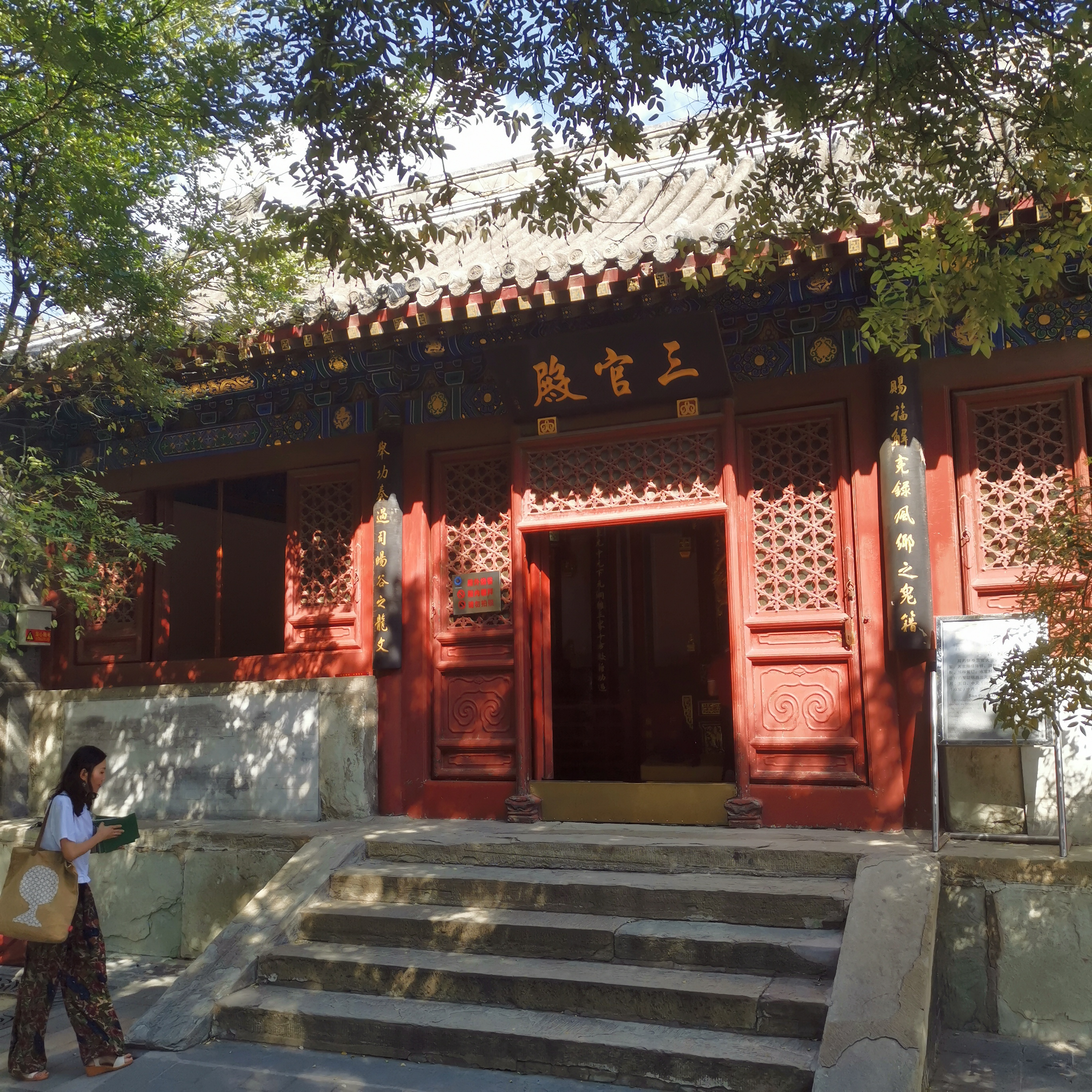 中文（中国大陆）: 北京白云观三官殿